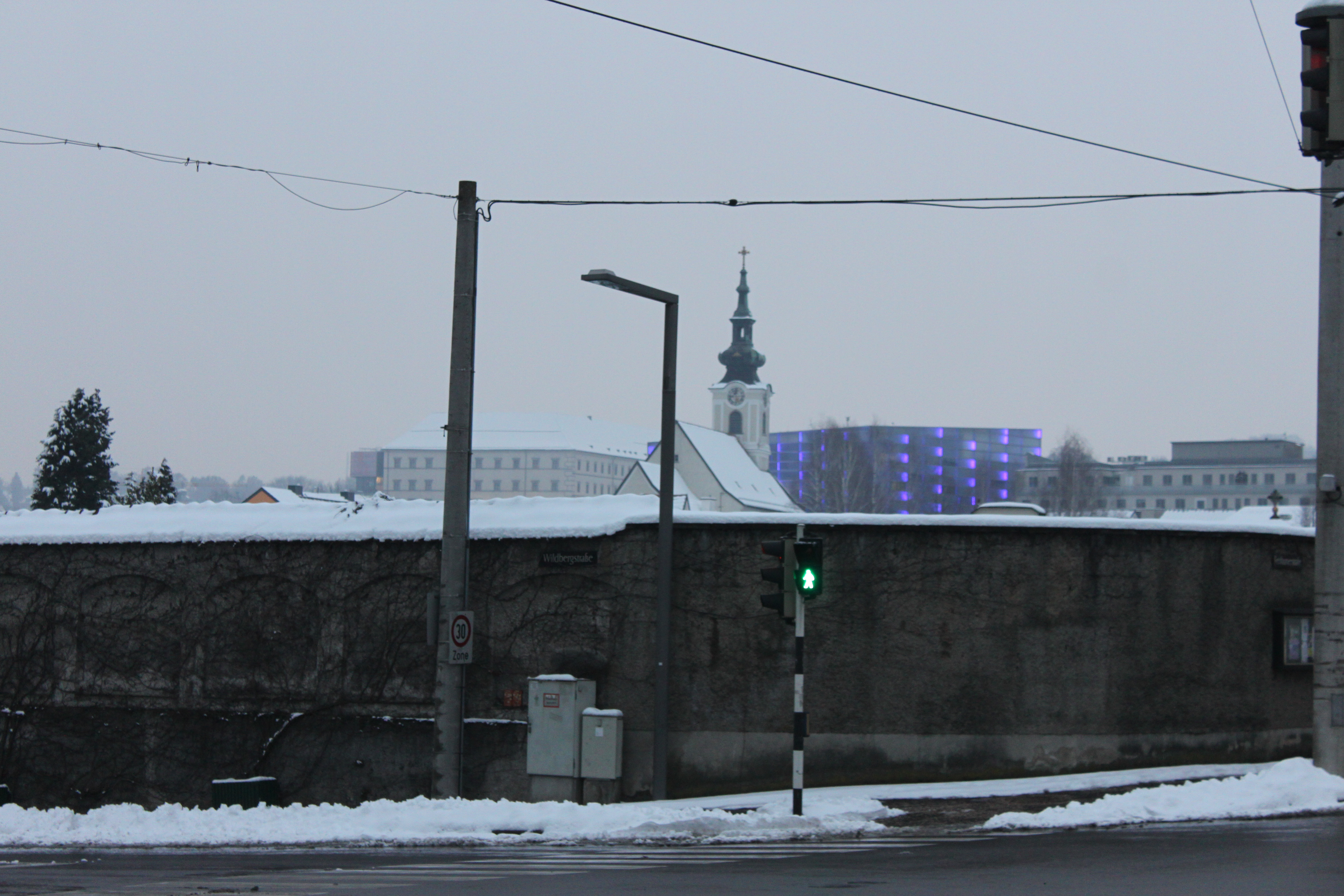 Umfriedung Wildbergstraße Friedhof Urfahr, dahinter Urfahrer Josefskirche, links der Kirche Linzer Schloss rechts der Donau, rechts der Kirche Ars Electronica Center